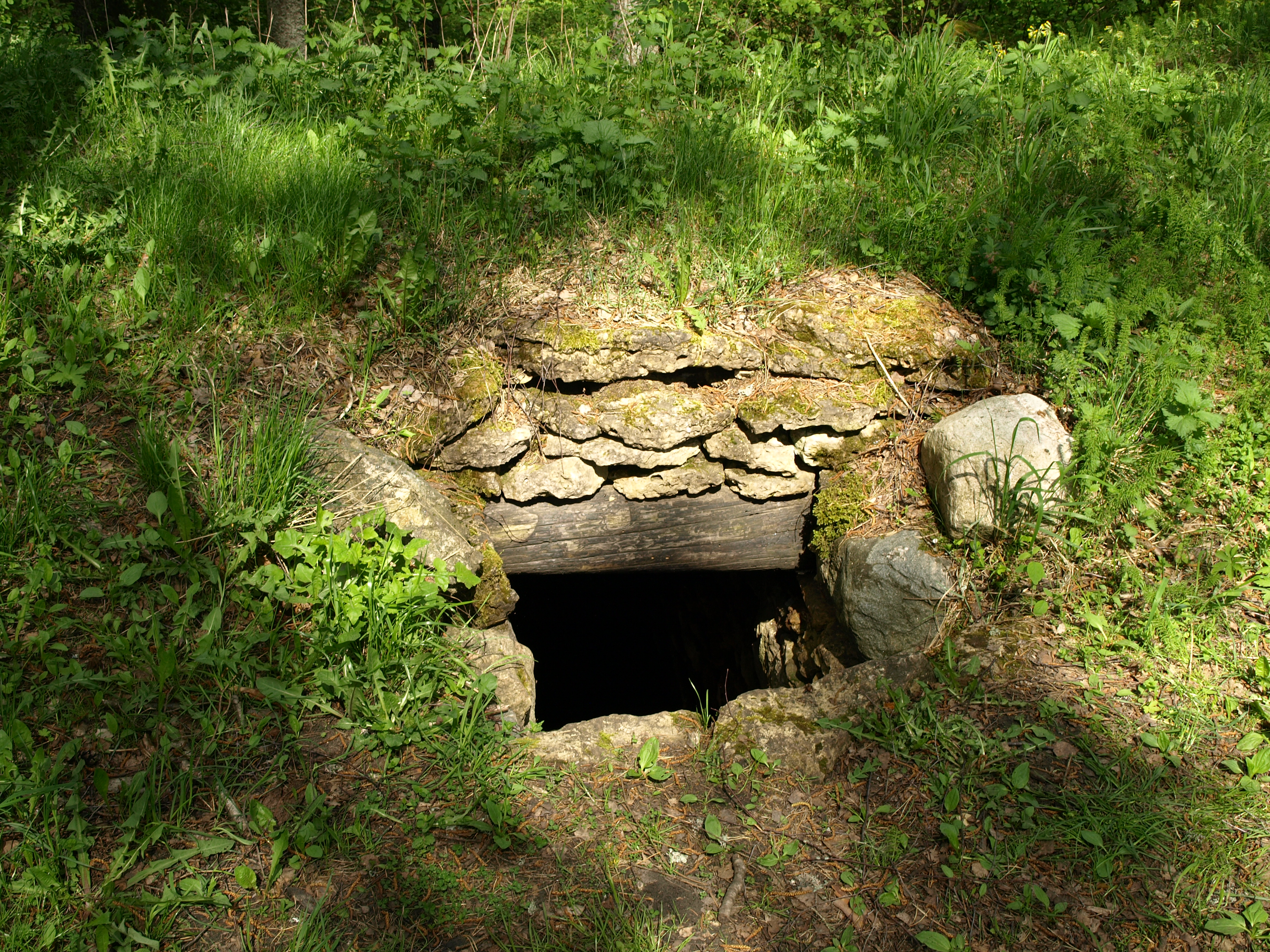 Eesti muinaslinnuste juures haruldane salakäik